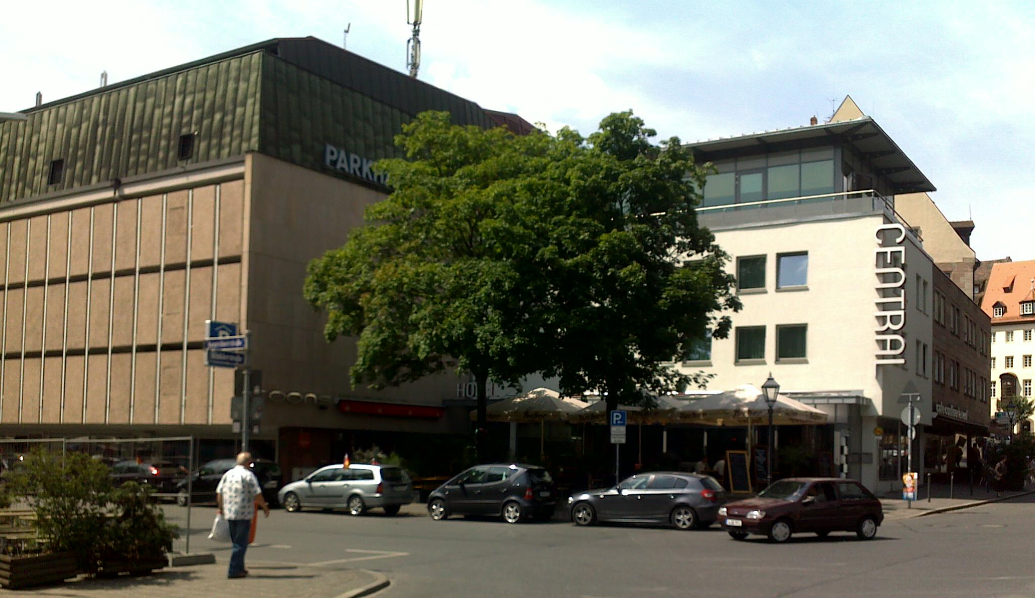 Parkhaus und Cafe in der Augustinerstrasse Ecke Winklerstrasse - Nürnberg - ehemaliger Standort des Augustinerklosters